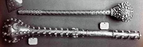 (Serbian: Мáцe) Maces